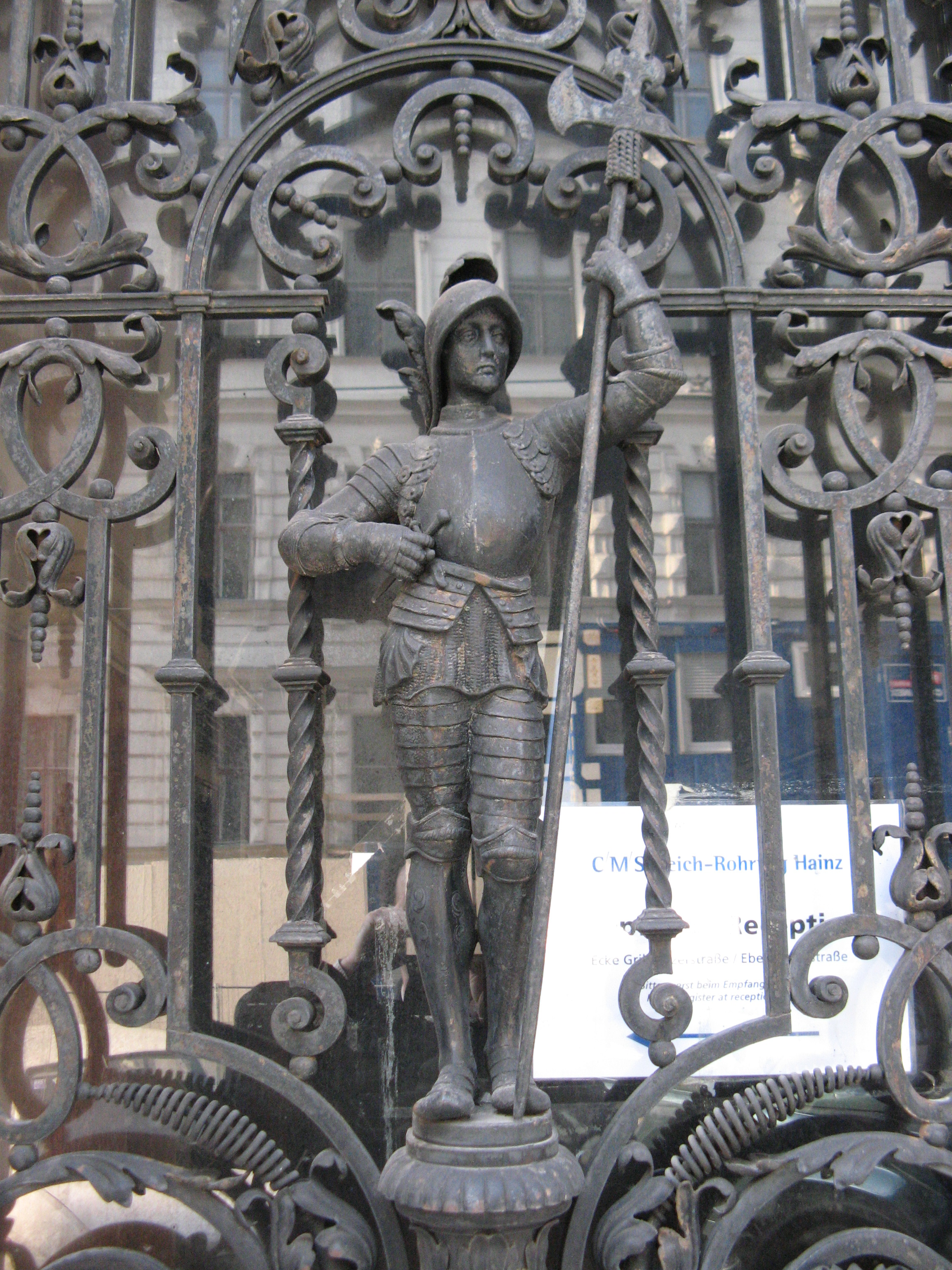 Ritter am Schmiedeeisentor des ehemaligen Hauses Sternberg (1890-91) von Carl Stephann, Grillparzerstraße 5, Wien-Innere Stadt